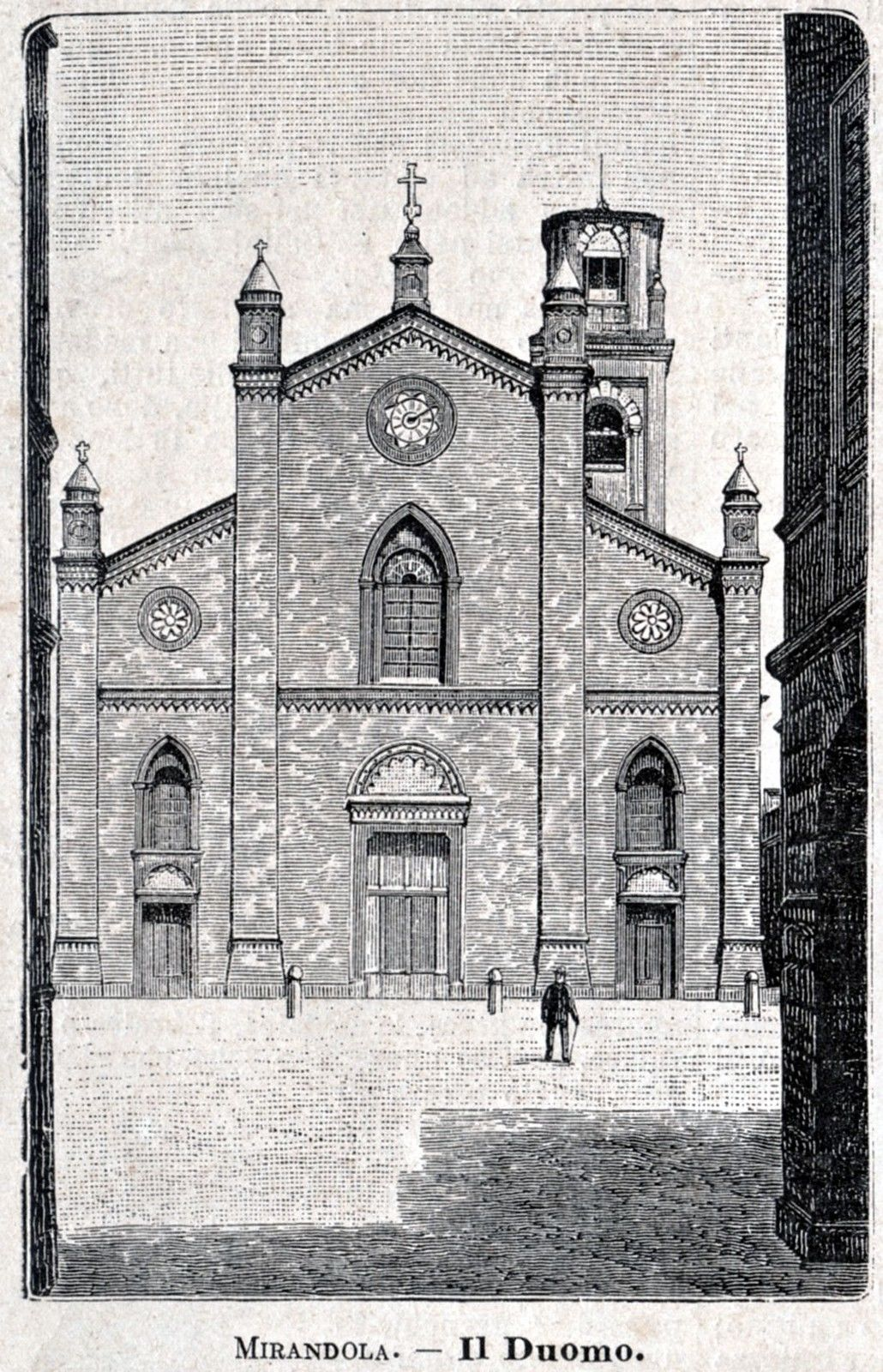 Mirandola - Il Duomo (xilografia, 1889)